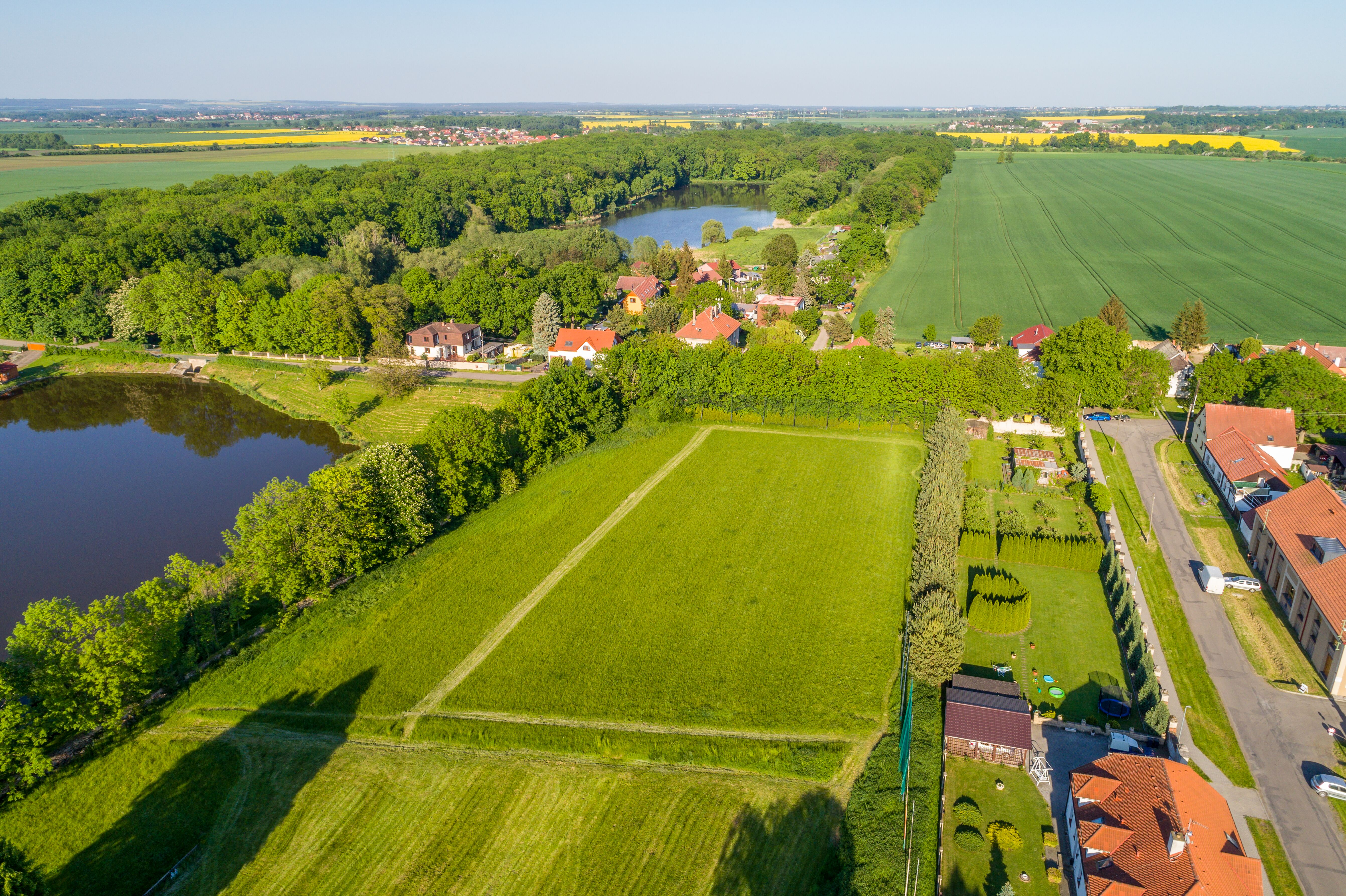 Východní část historické zámecké bažantnice (dnes nazývané Velká bažantnice), které přiléhá k hospodářskému dvoru a navazuje celý areál na okolní krajinu.